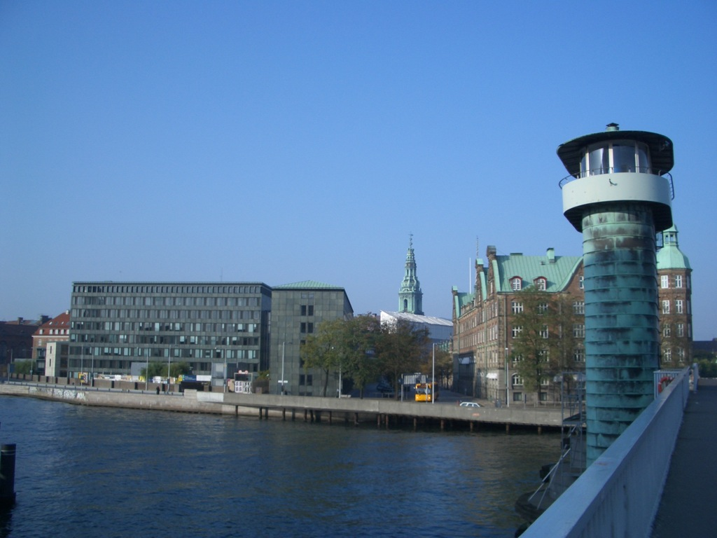 Tjæreborg (1962-1967) seen from Knippelsbro in Copenhagen, Denmark